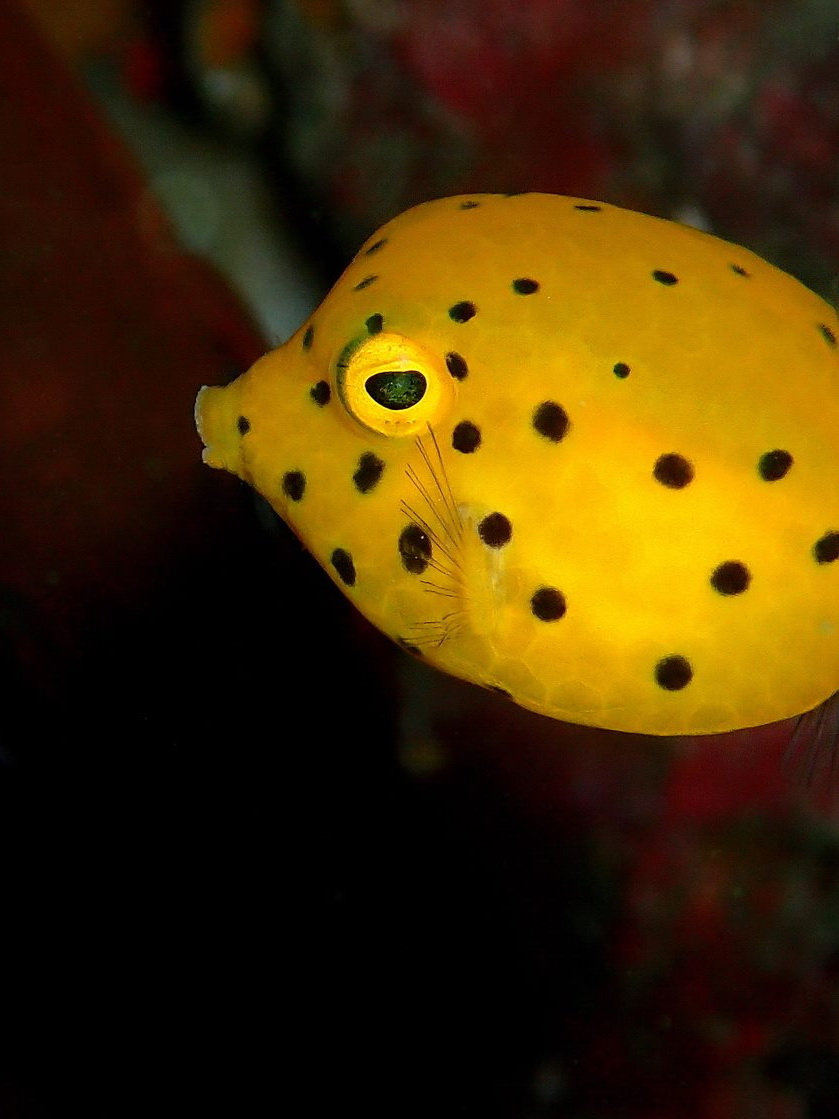 This cute yellow boxfish (Ostracion cubicus) was found at the shallow water in Pitou Cape, a famous diving site located at northeast coast of TAIWAN. The photo was taken by Vincent C. Chen on July 26, 2015